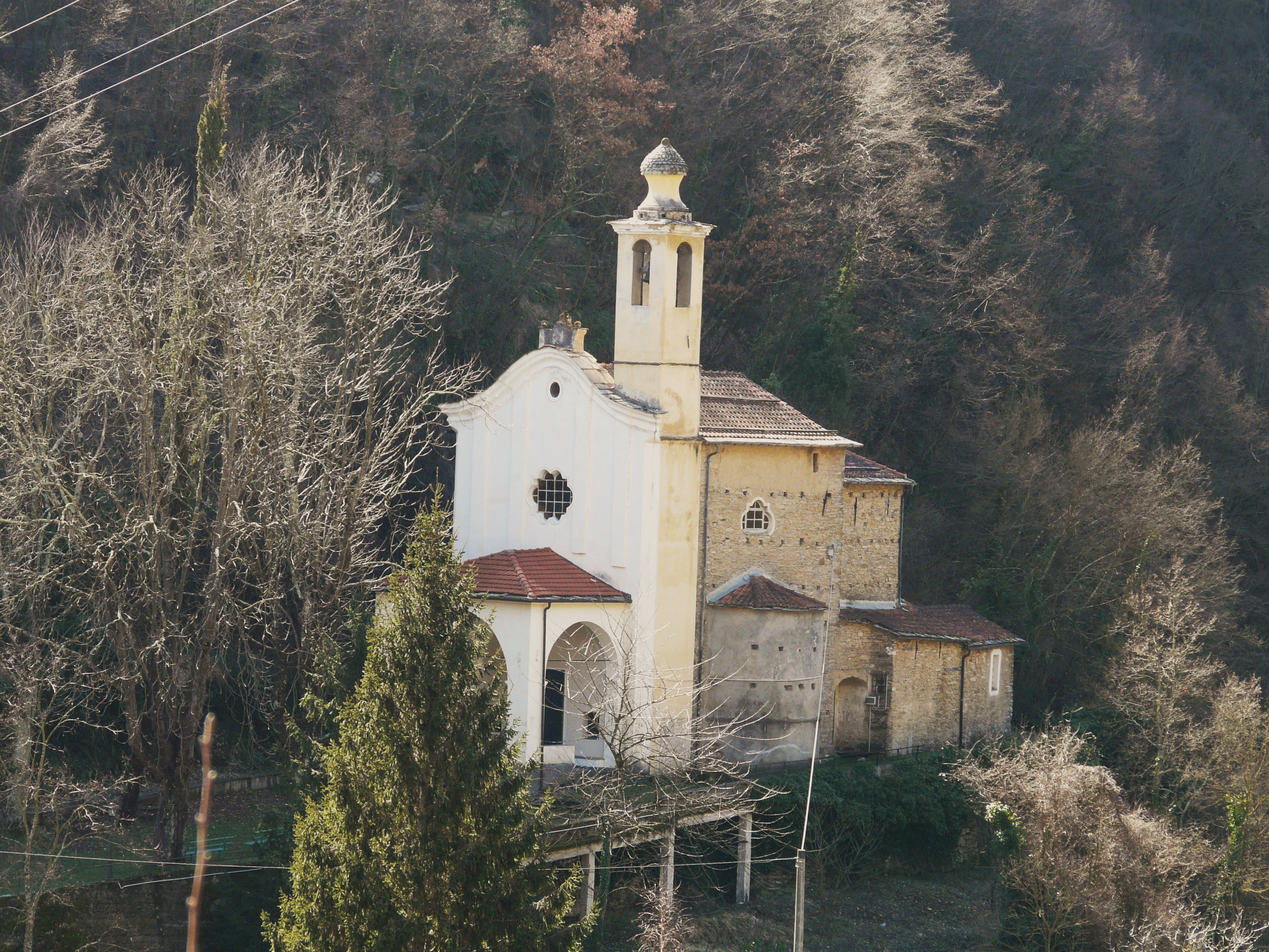 Santuario della Madonna della Neve, Rezzo, Liguria, Italia